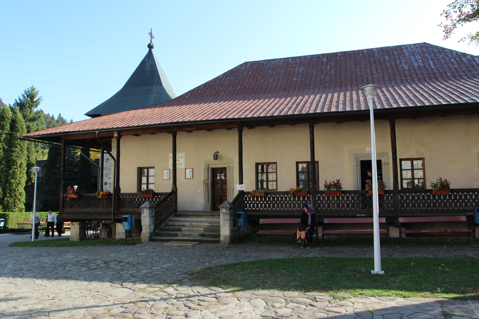 Casa Petru Rareș 04